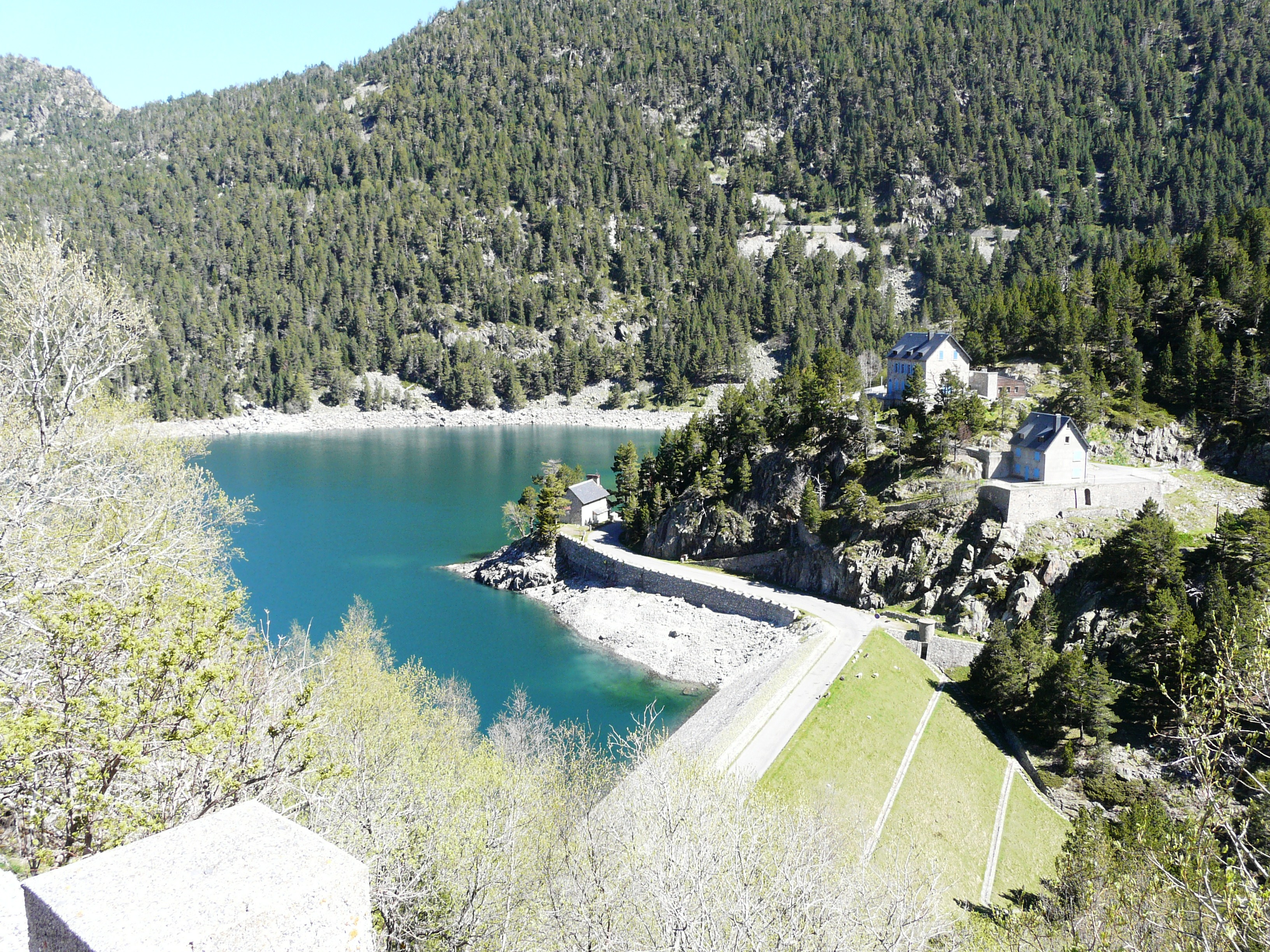 Le barrage d'Orédon vu du sud, Aragnouet, Hautes-Pyrénées, France. Toute la zone située au-delà des maisons se trouve sur l'enclave de la commune de Saint-Lary-Soulan.